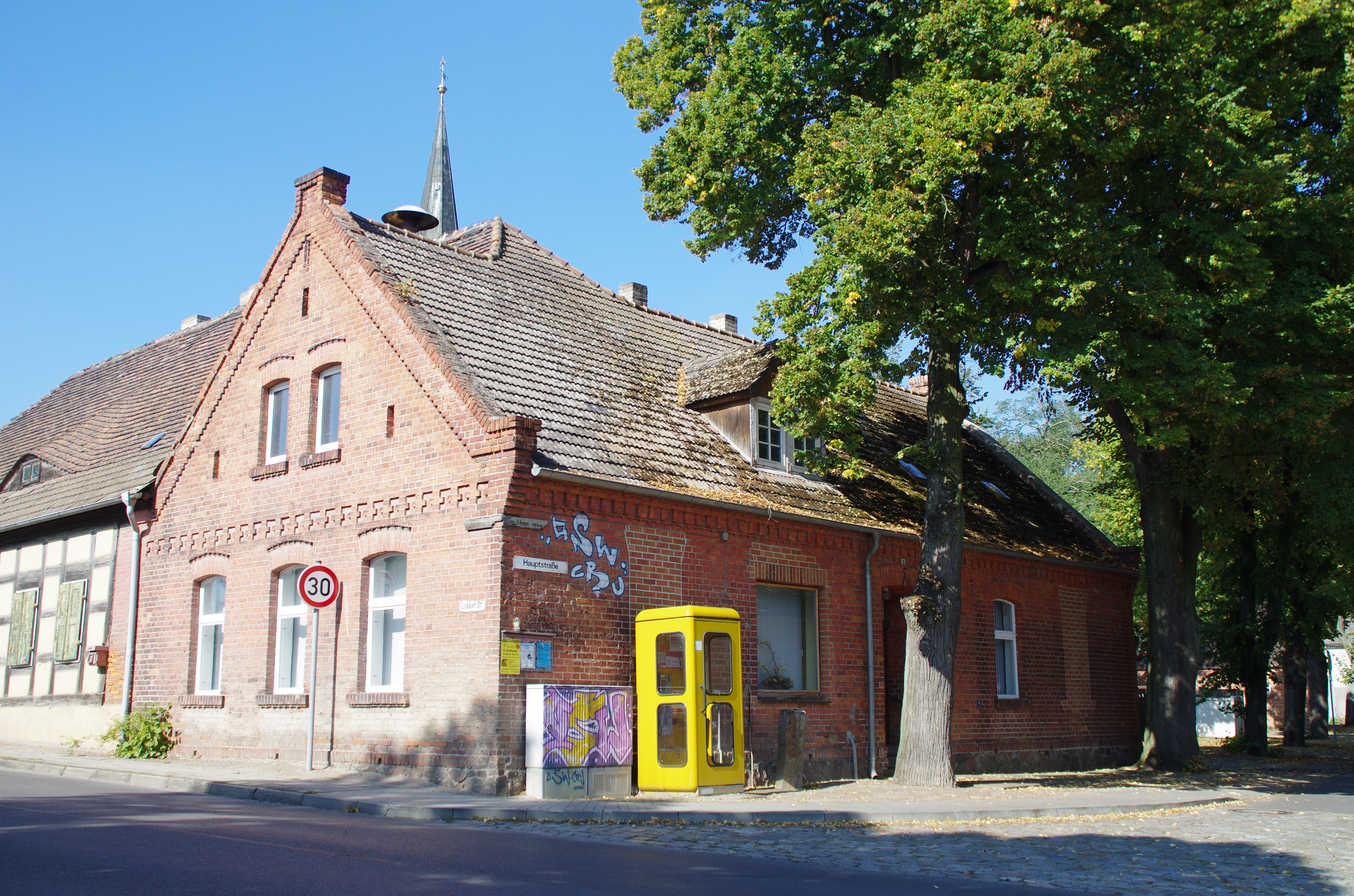 Lübbenau/Spreewald in Brandenburg. Das Haus in der Hauptststraße 15 in Zerkwitz steht unter Denkmalschutz.